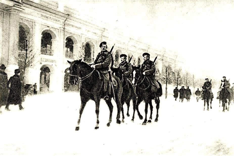 Конный патруль на улицах Петербурга 9 января 1905 года